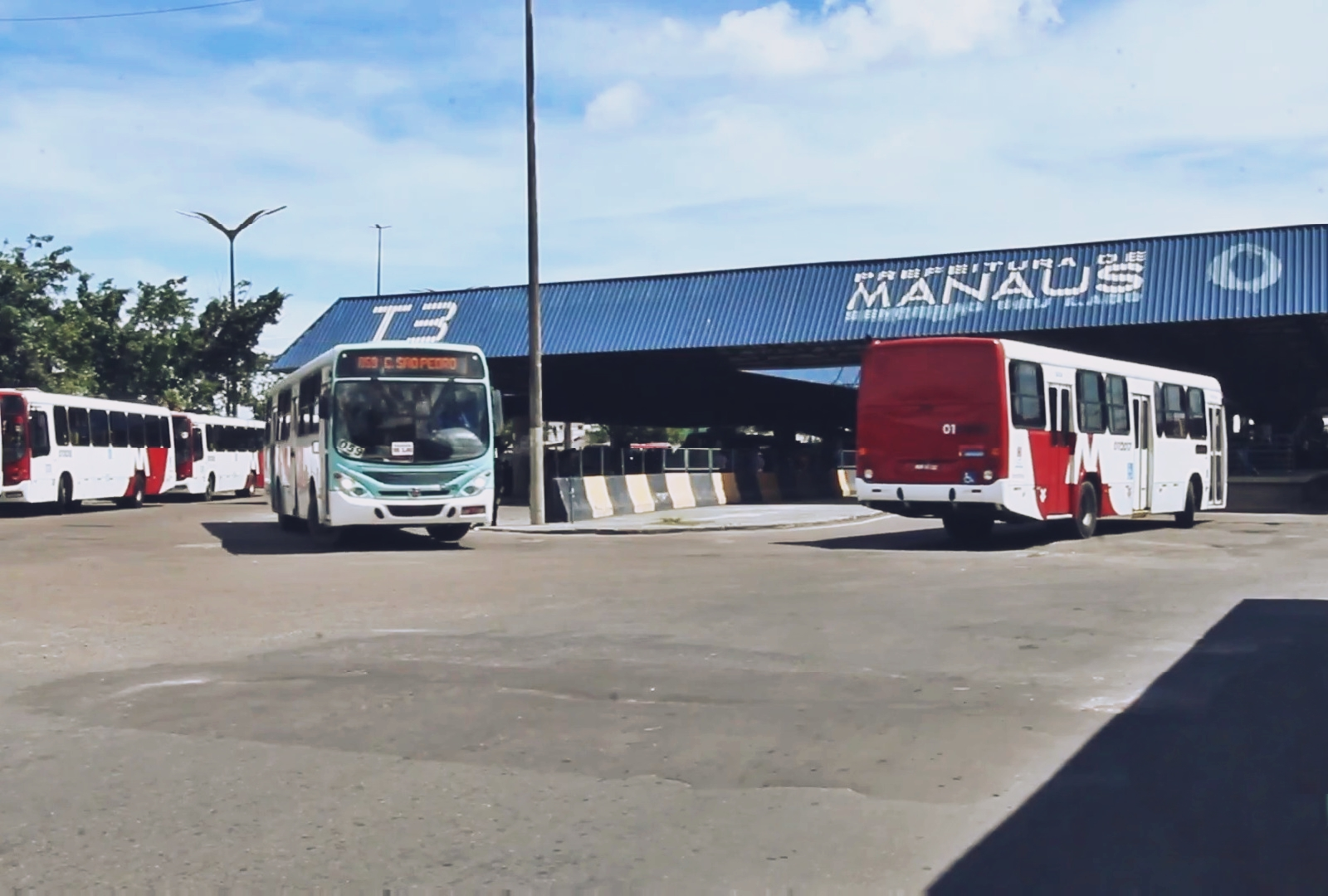 Terminal de integração 3, localizado no bairro Cidade Nova, em Manaus, Brasil.